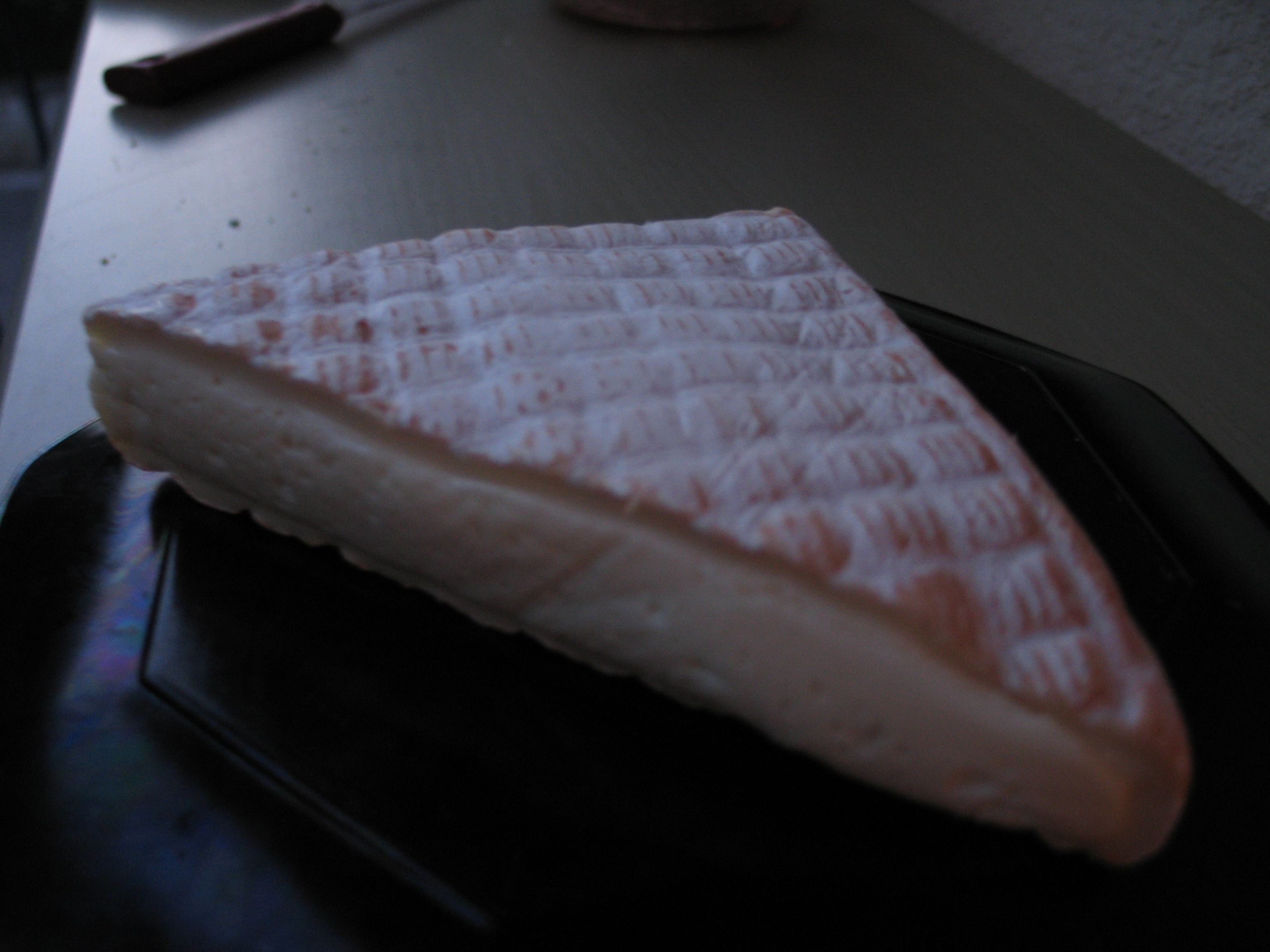 Fromage "Le Vieux Pané"